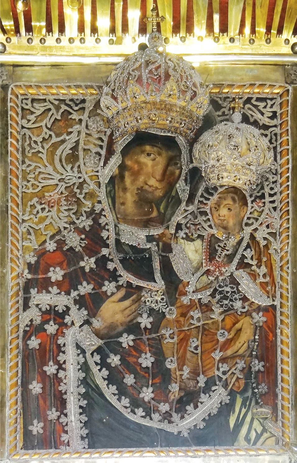 Vera effigies Beatae Mariae Virginis flentis in Transylvania ad Claudiopoli 1699.